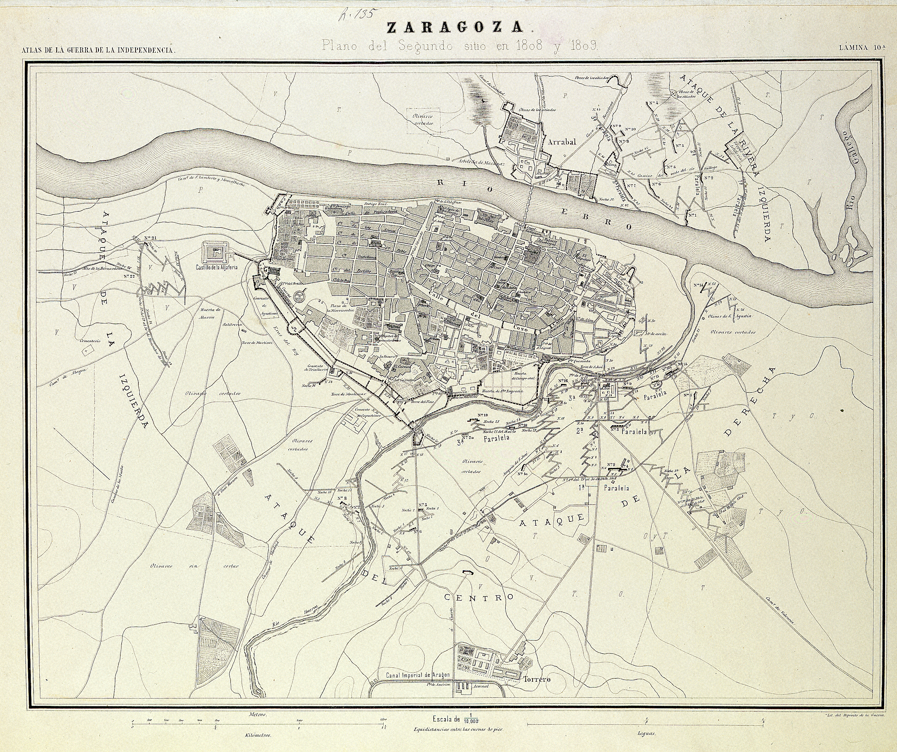 Plano del segundo sitio de Zaragoza, Spain Separatas del atlas de la Guerra de la Independencia editadas por el Depósito de la Guerra, en 1.868, como complemento a la obra del general don José Gómez de ARTECHE, "Guerra de la Independencia. Historia militar de España de 1808 a 1814".